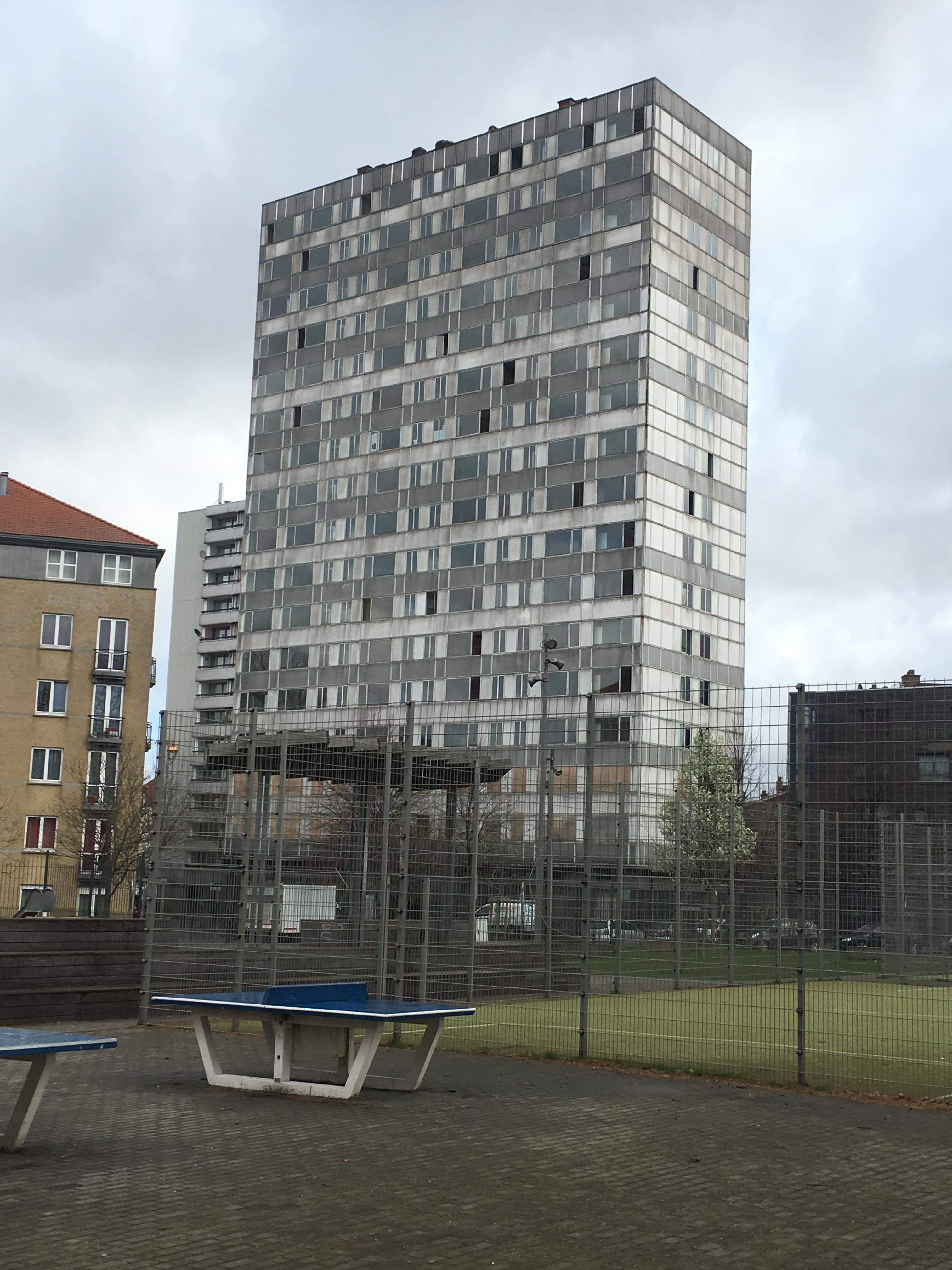 Zicht op de Brunfauttoren van het nabijgelegen speelpleintje naast het kanaal Brussel-Charleroi.